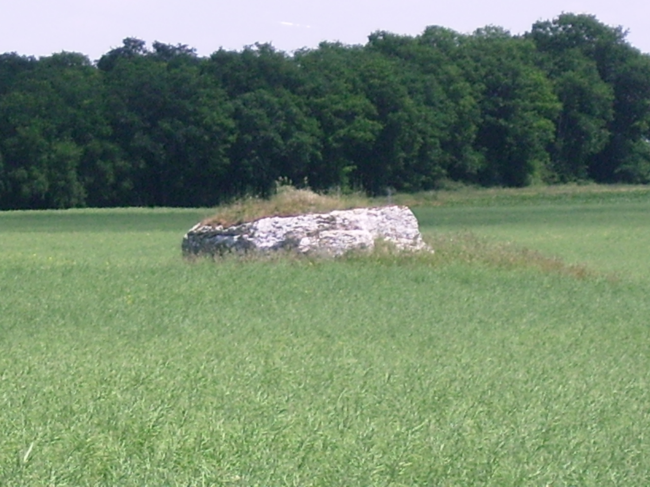 Dolmen de la Mouïse-Martin à Tripleville.